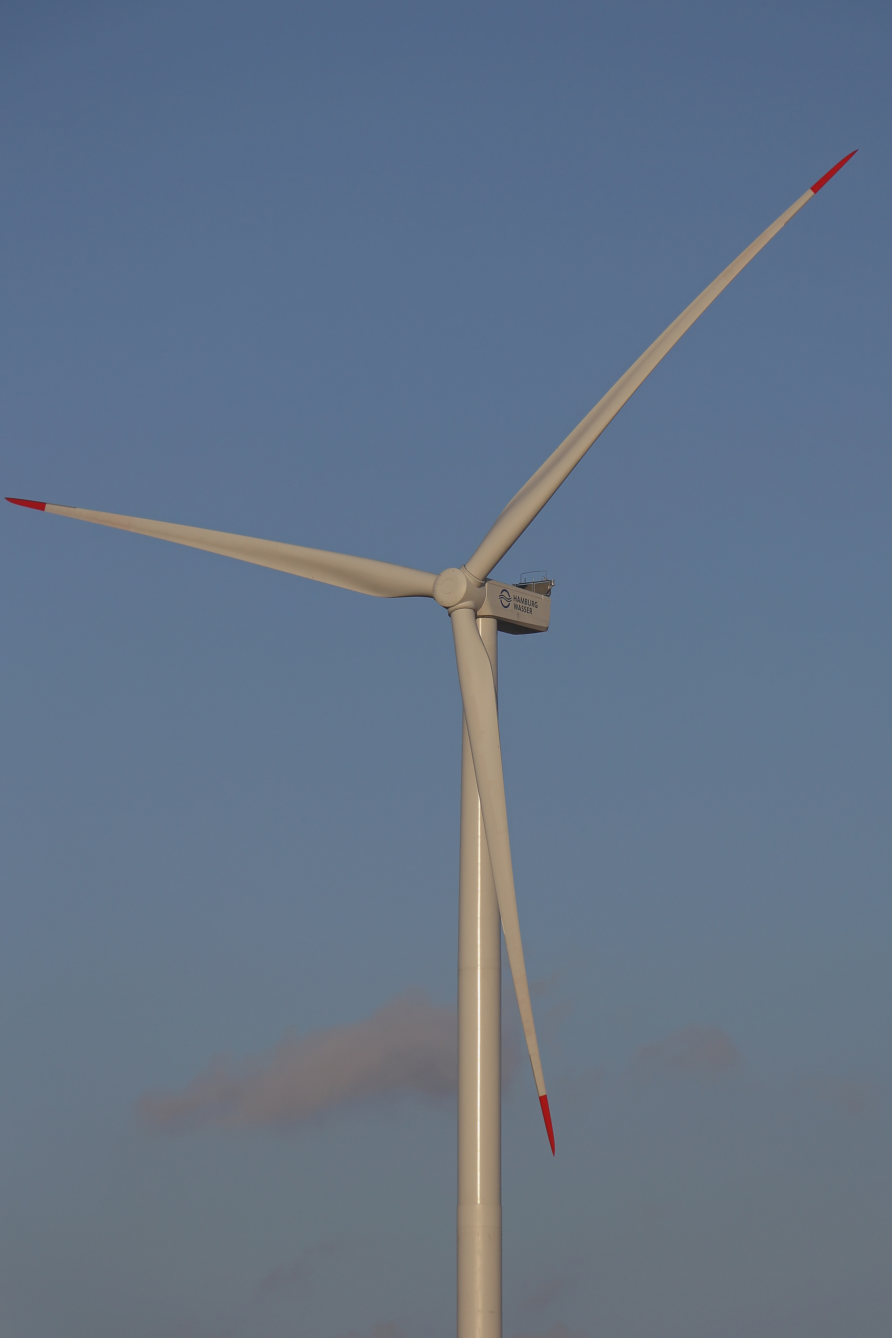 Windturbine des Typs Nordex N117/3000 auf auf 141-m-Hybridturm auf dem Gelände von Hamburg Wasser in Steinwerder